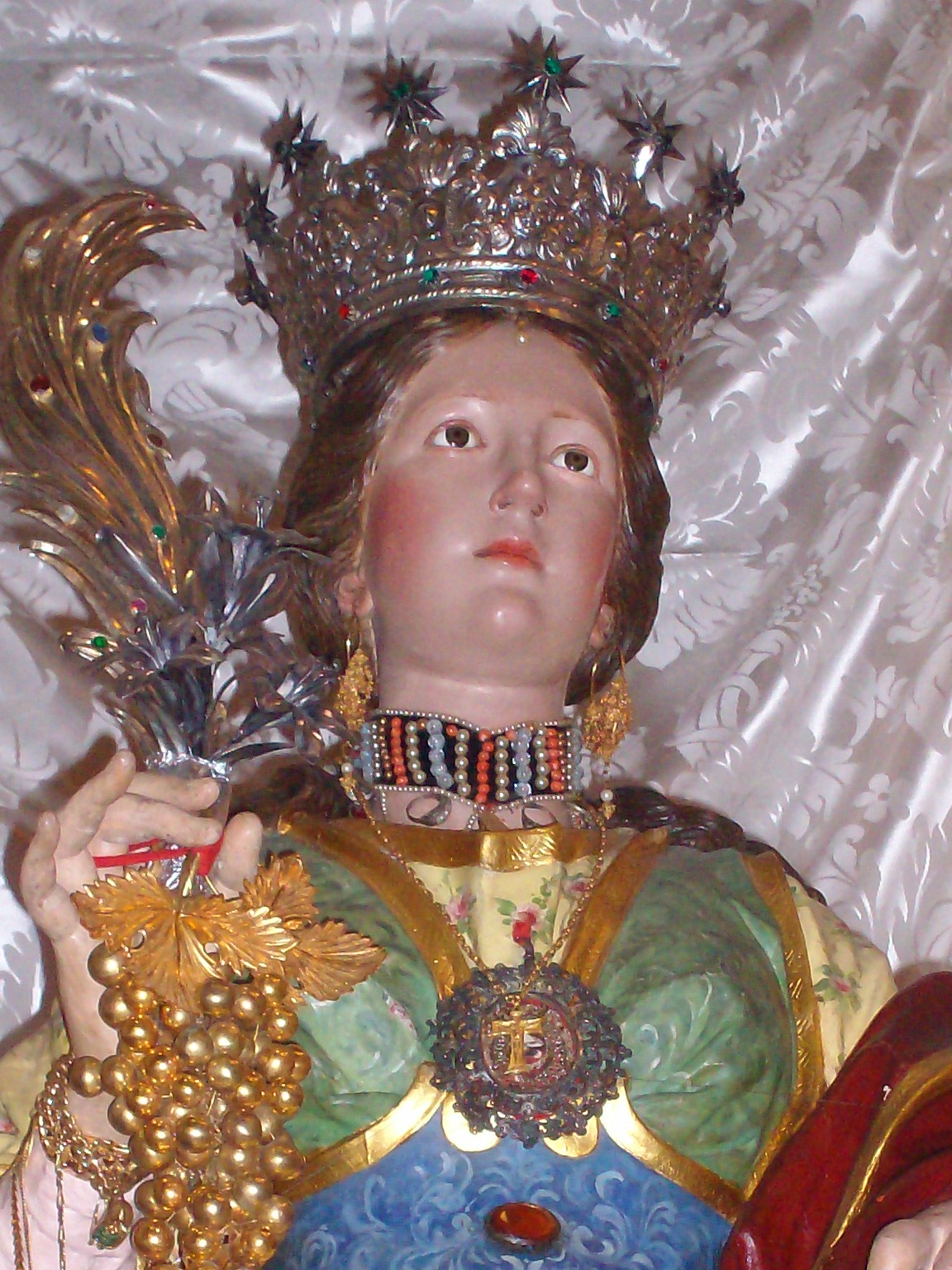 Santa Restituta, busto ligneo policromo del 1711, santuario della santa a Lacco Ameno (NA), autore: Vito Calise, licenza d'uso: PD-Utente.